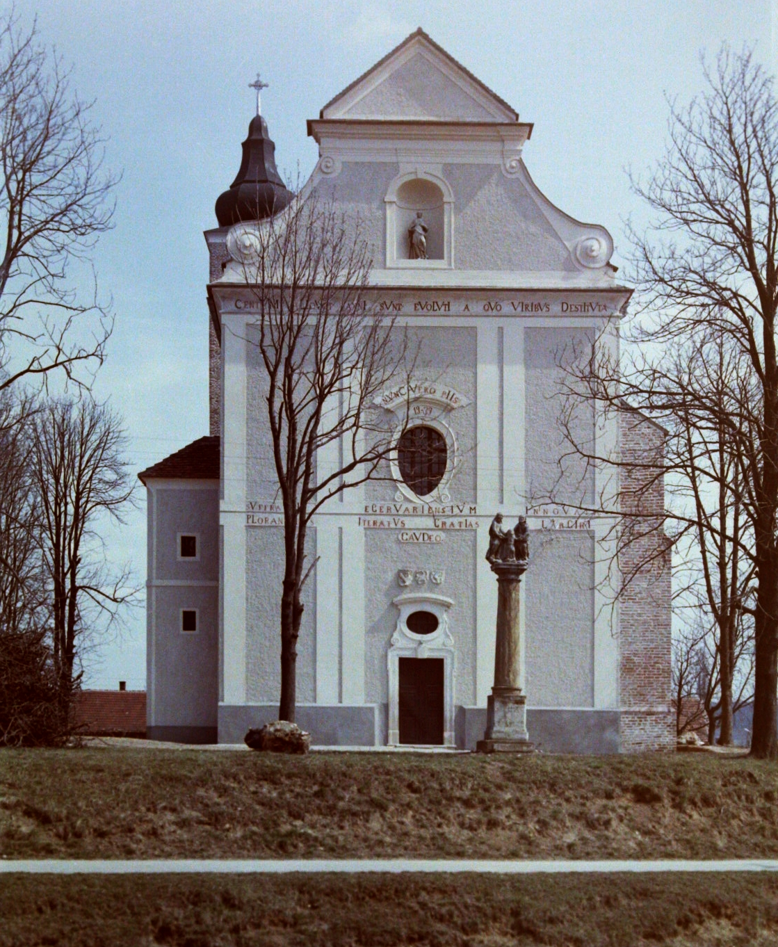 József Attila u. 1. Alexandriai Szent Katalin katolikus templom. Location: Hungary, Egervár Tags: colorful Title: József Attila u. 1. Alexandriai Szent Katalin katolikus templom.